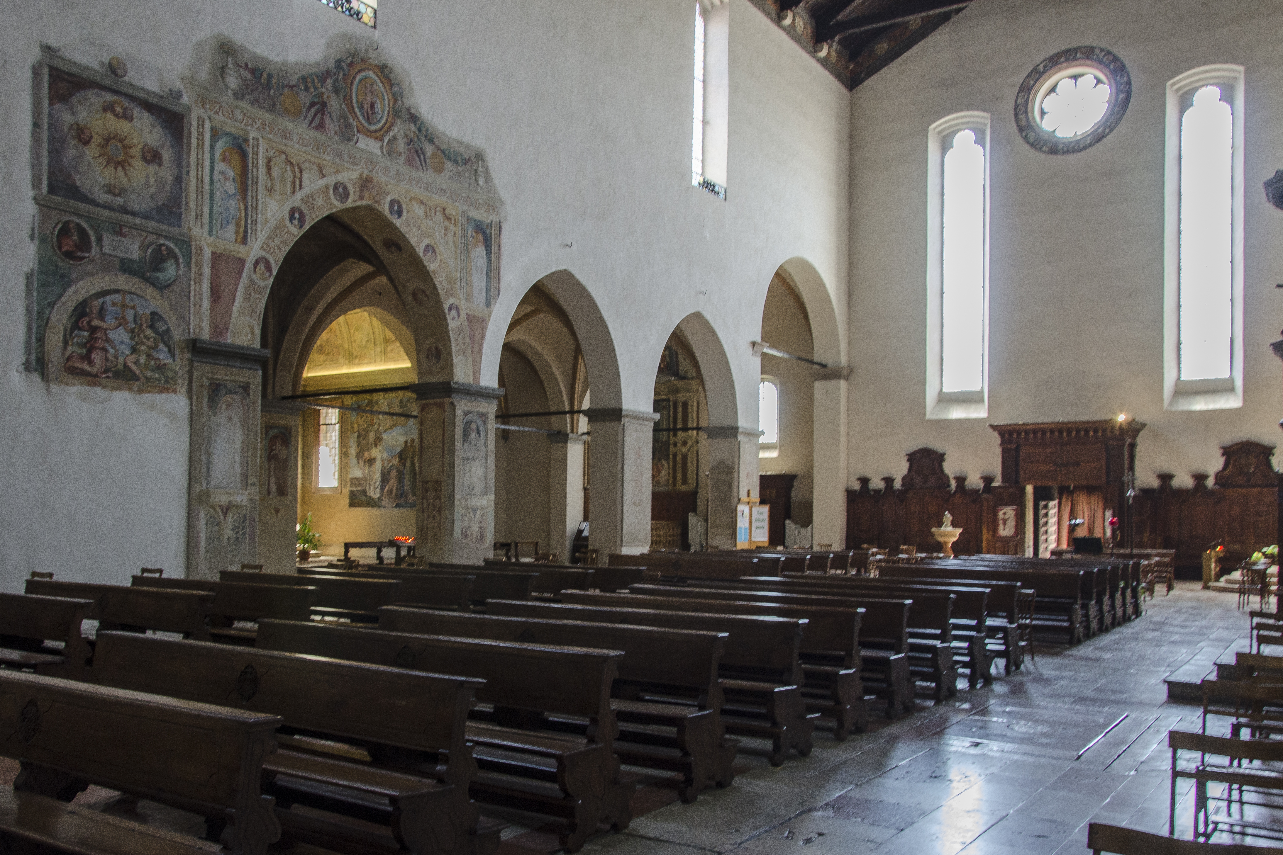 Chiesa di San Bernardino a Verona